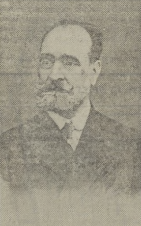 Mariano Fortuny Portell